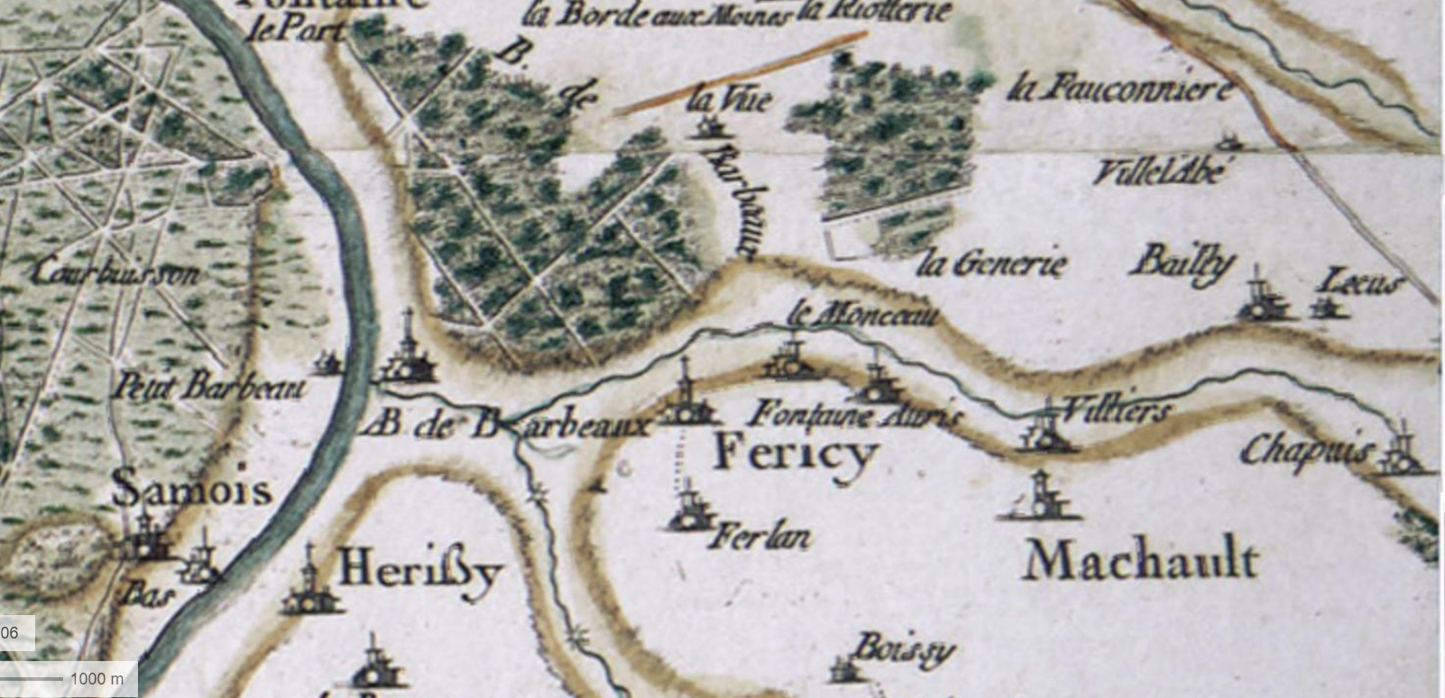 Zoom sur Féricy et ses alentours depuis la de carte de Cassini.